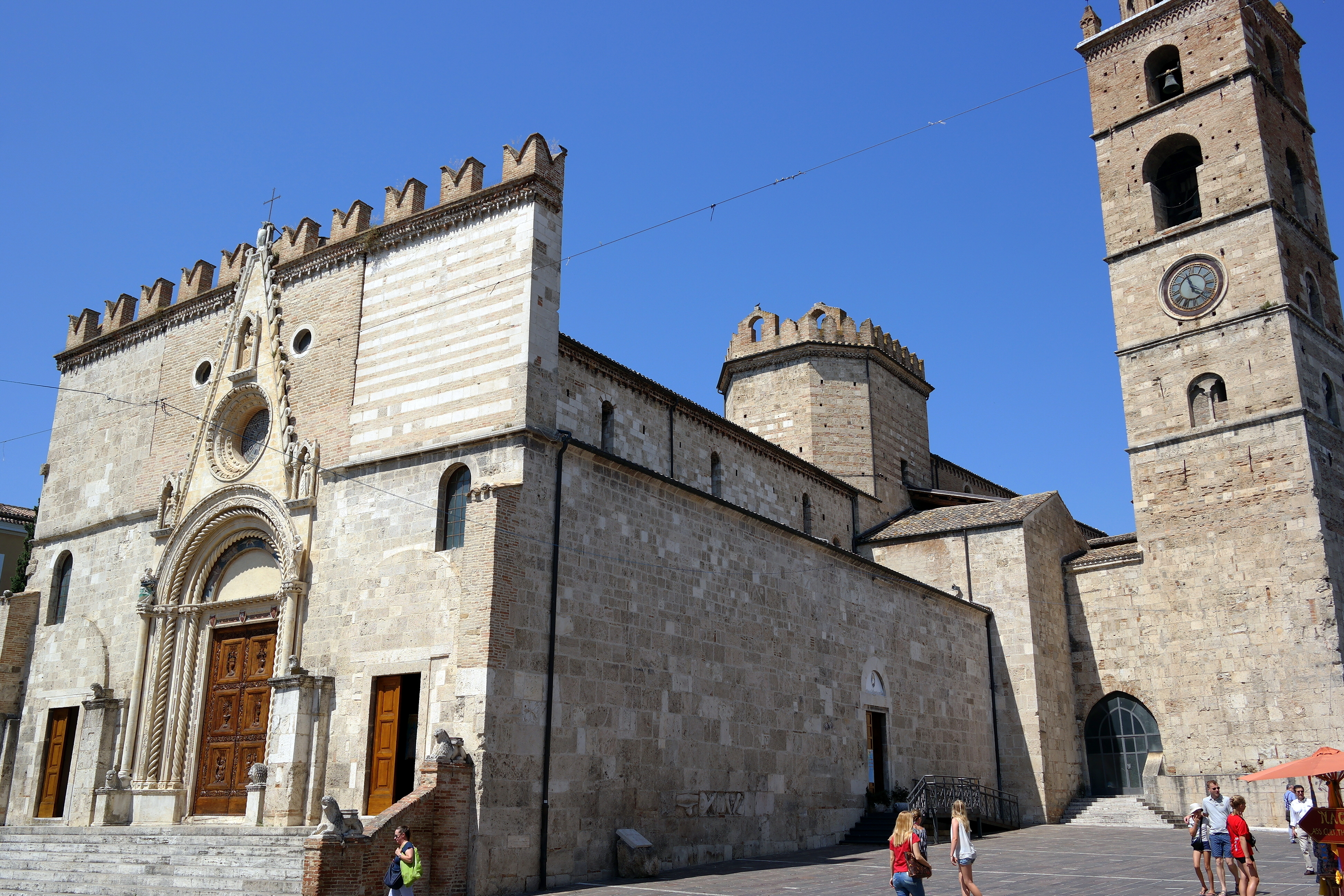 Esterno del Duomo di Teramo